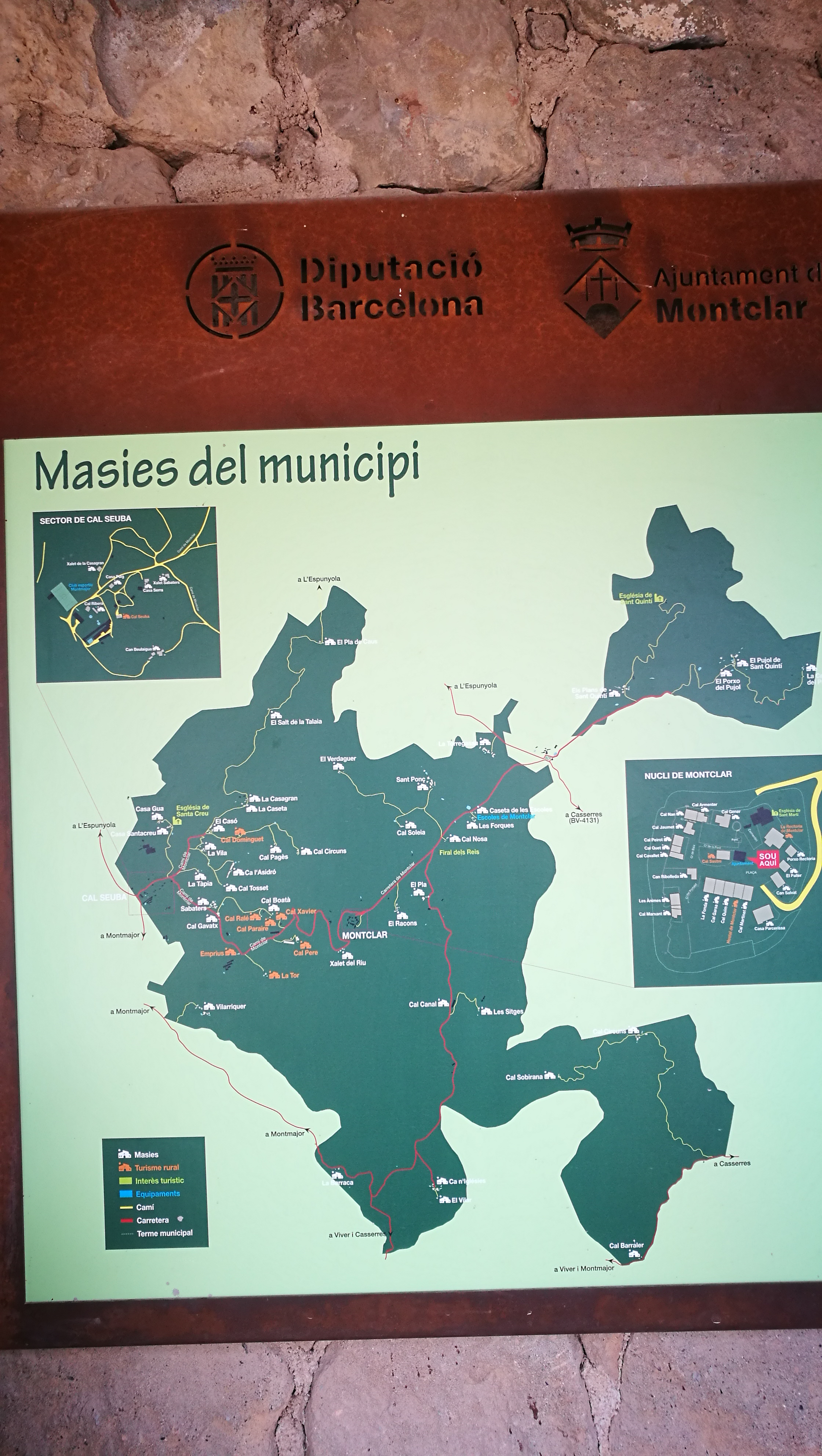 mapa del municipi de Montclar